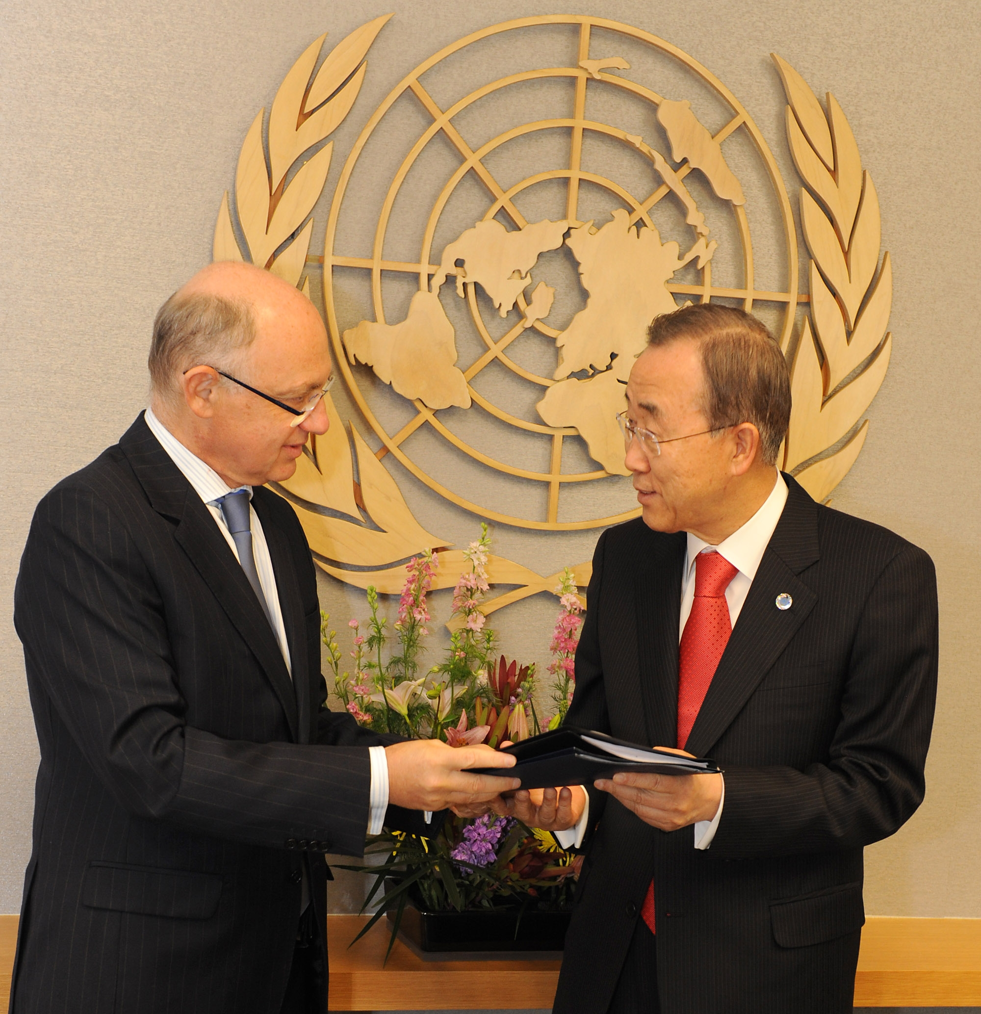 El canciller Héctor Timerman junto al secretario general de las Naciones Unidas, Ban Ki-moon